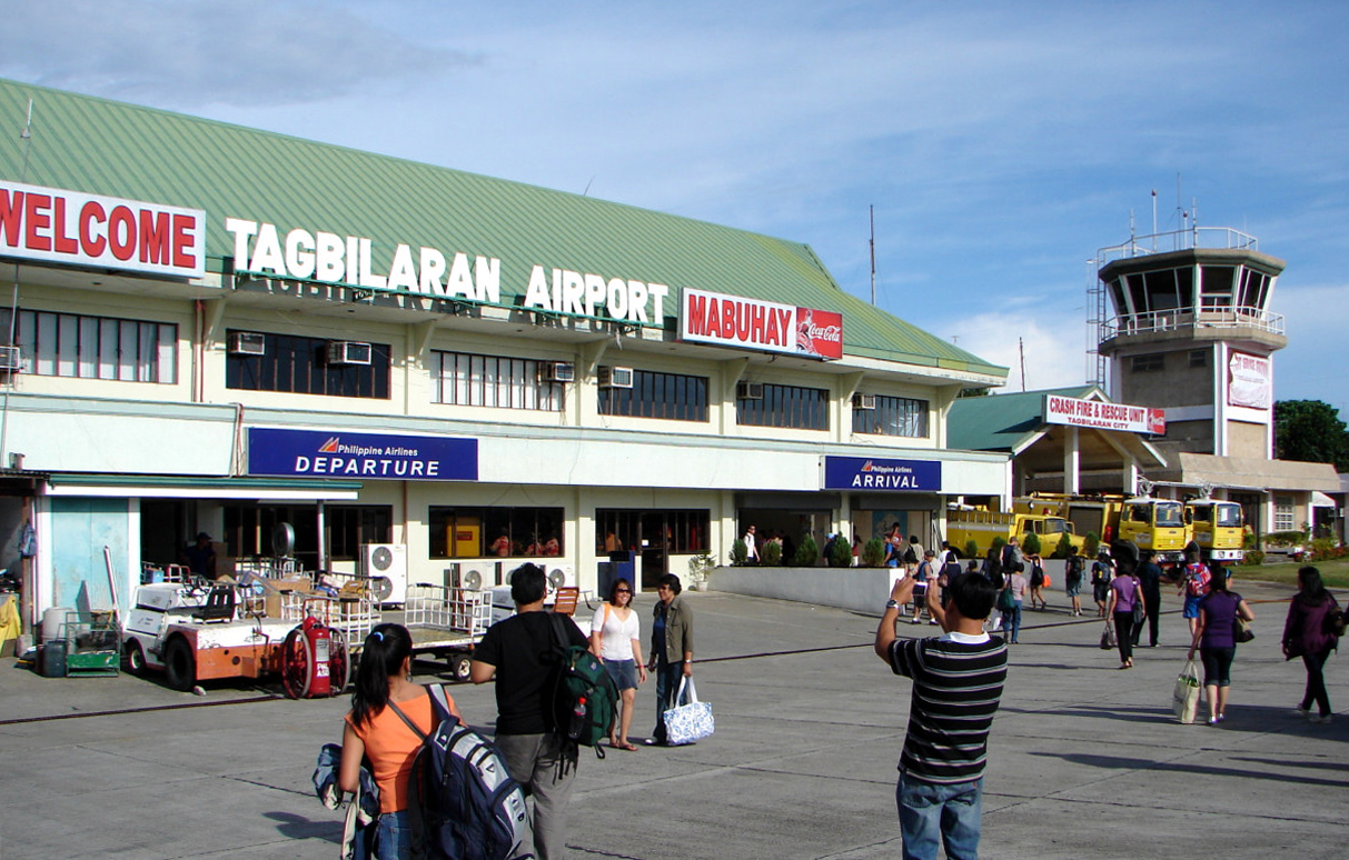 Tagbilaran Airport, Bohol, Philippines